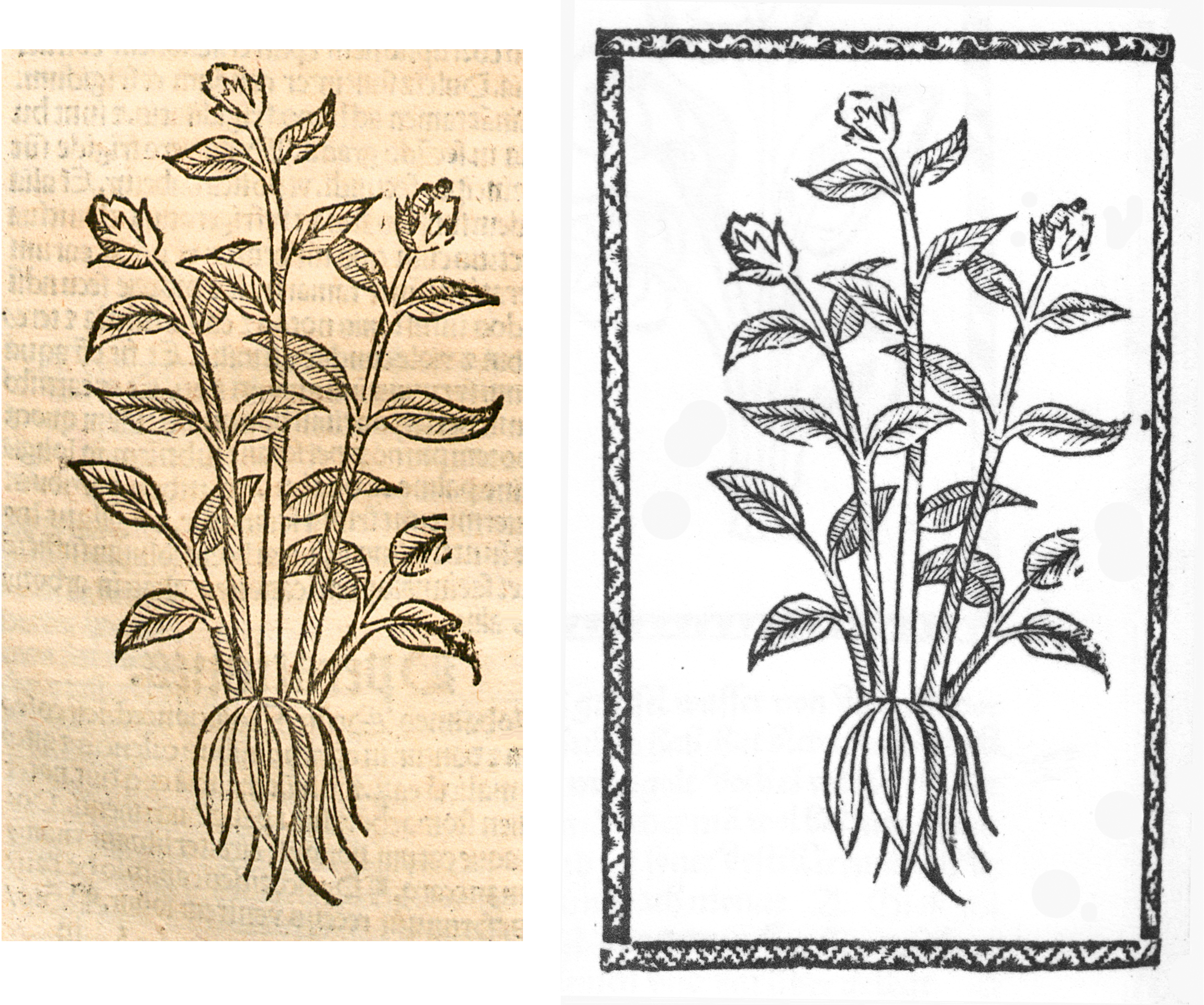 Abbildung zum Kapitel Güldin Gunsel (Ajuga reptans)